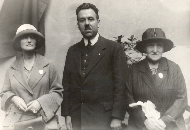 16. Esperanto-Weltkongress, Wien 1924. Prominente Teilnehmergruppe, v.l.n.r.: Lidia Zamenhof, Edmond Privat, Klara Zamenhof